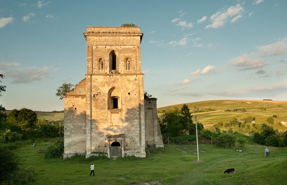 ruiny kościoła obronnego we wsi Buszcze z XVI w